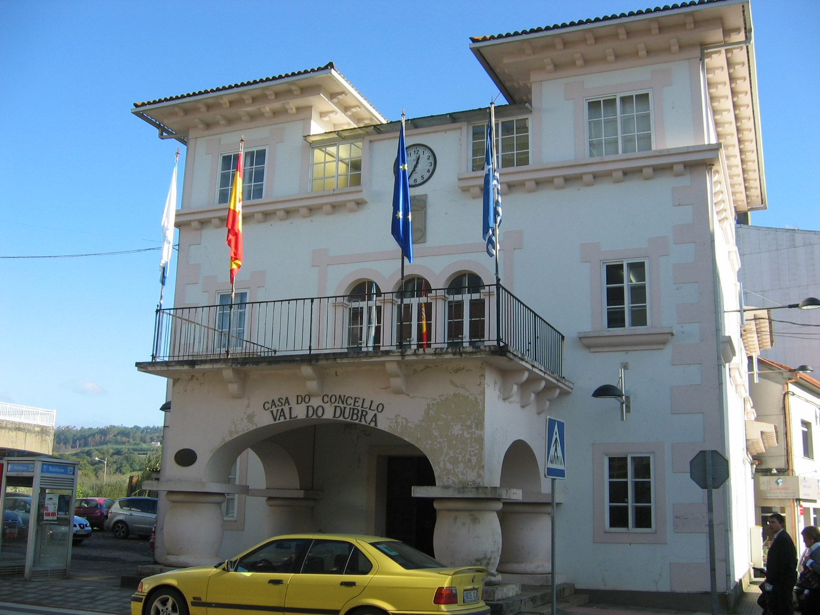 Casa do Concello de Val do Dubra.